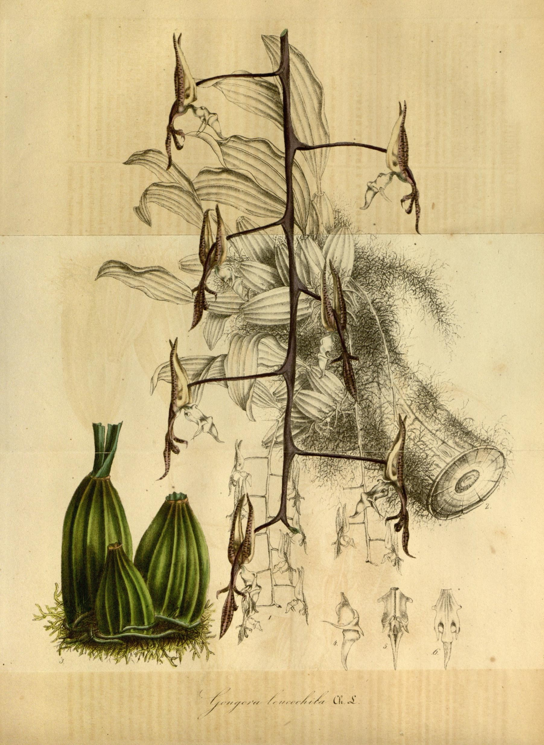 / / r// r^/'r/'r/ // f f ^'// / /^/ a..^.